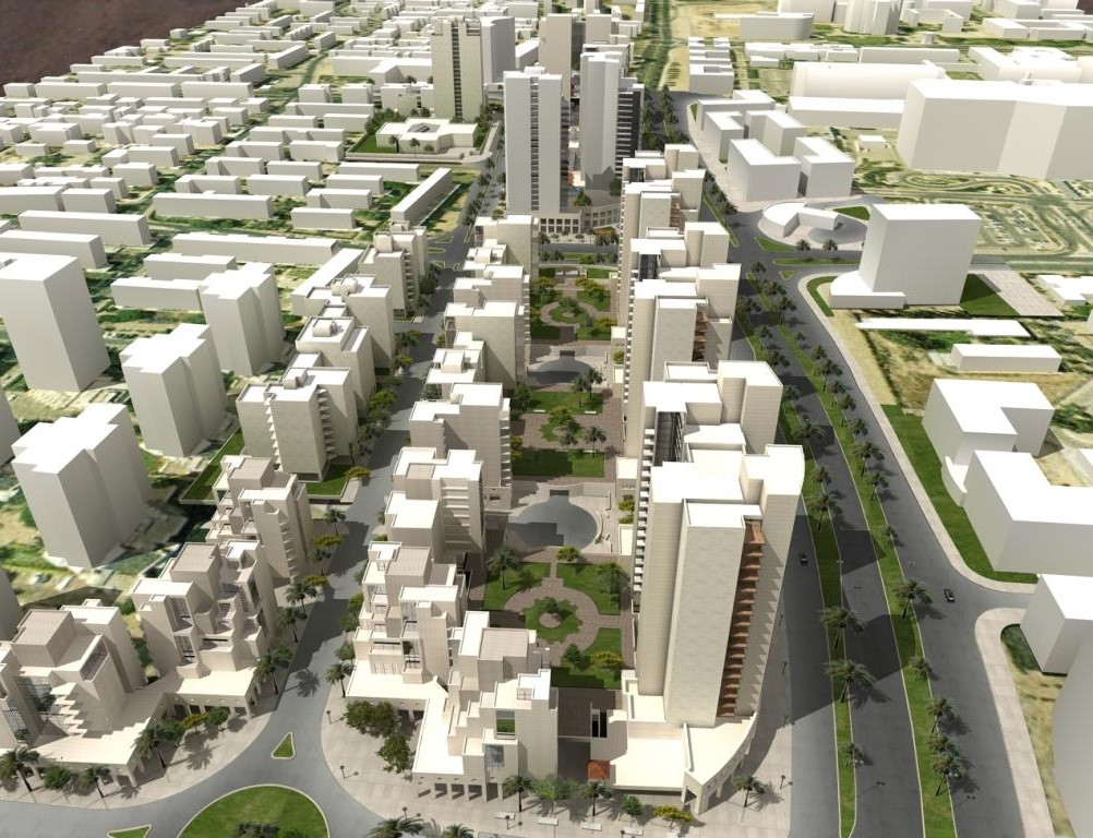 בינוי שדרות רגר בבאר שבע